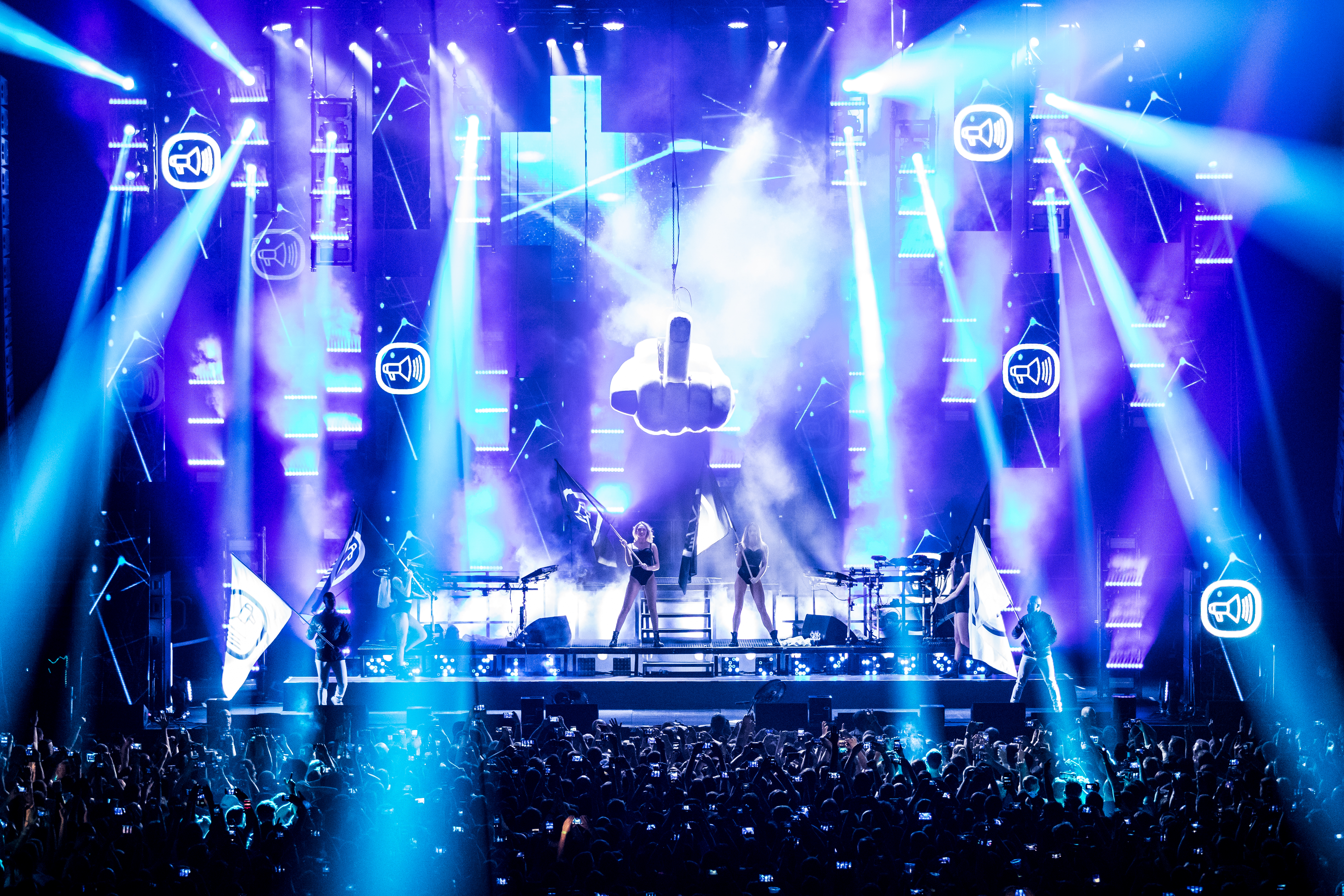 Scooter during Scooter - 25 Years Wild & Wicked at SAP Arena, Mannheim, Baden-Württemberg, Germany on 2018-12-03, Photo: Sven Mandel